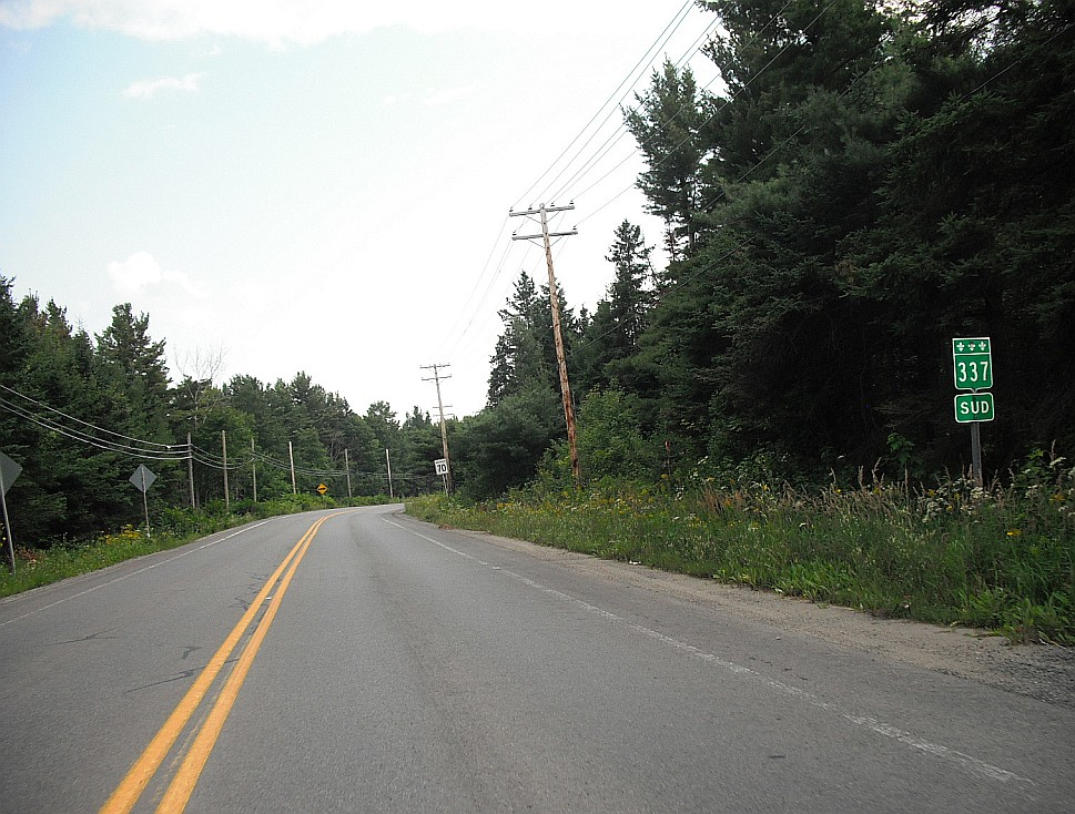 Vue sur la route 337, dans la municipalité de Sainte-Julienne, Québec, Canada.